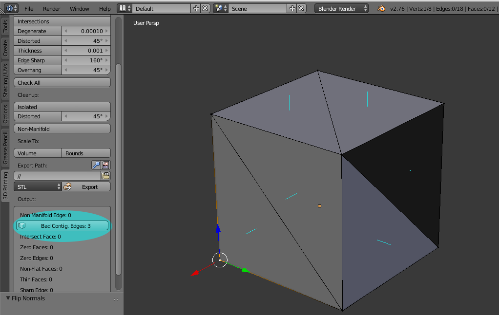 STL with inverted normal (made with Blender).